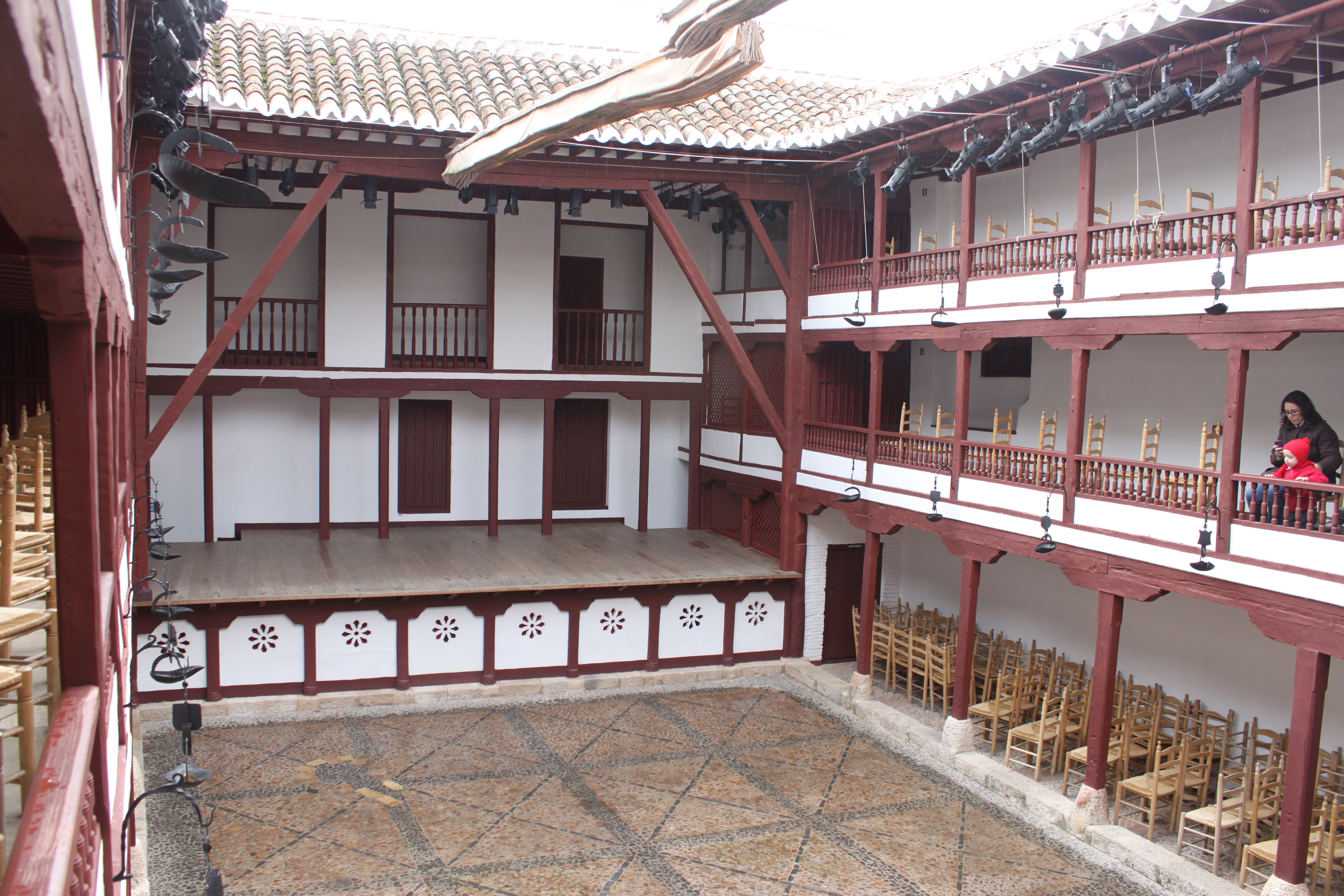 Vista general del escenario, patio y palcos.